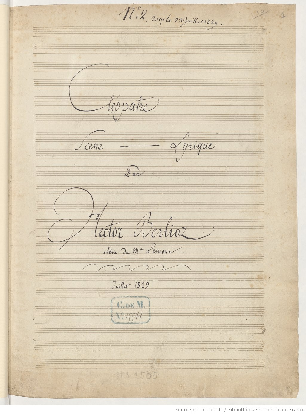 page de titre du manuscrit de "Cléopâtre" d'Hector Berlioz, cantate pour le prix de Rome, 1829